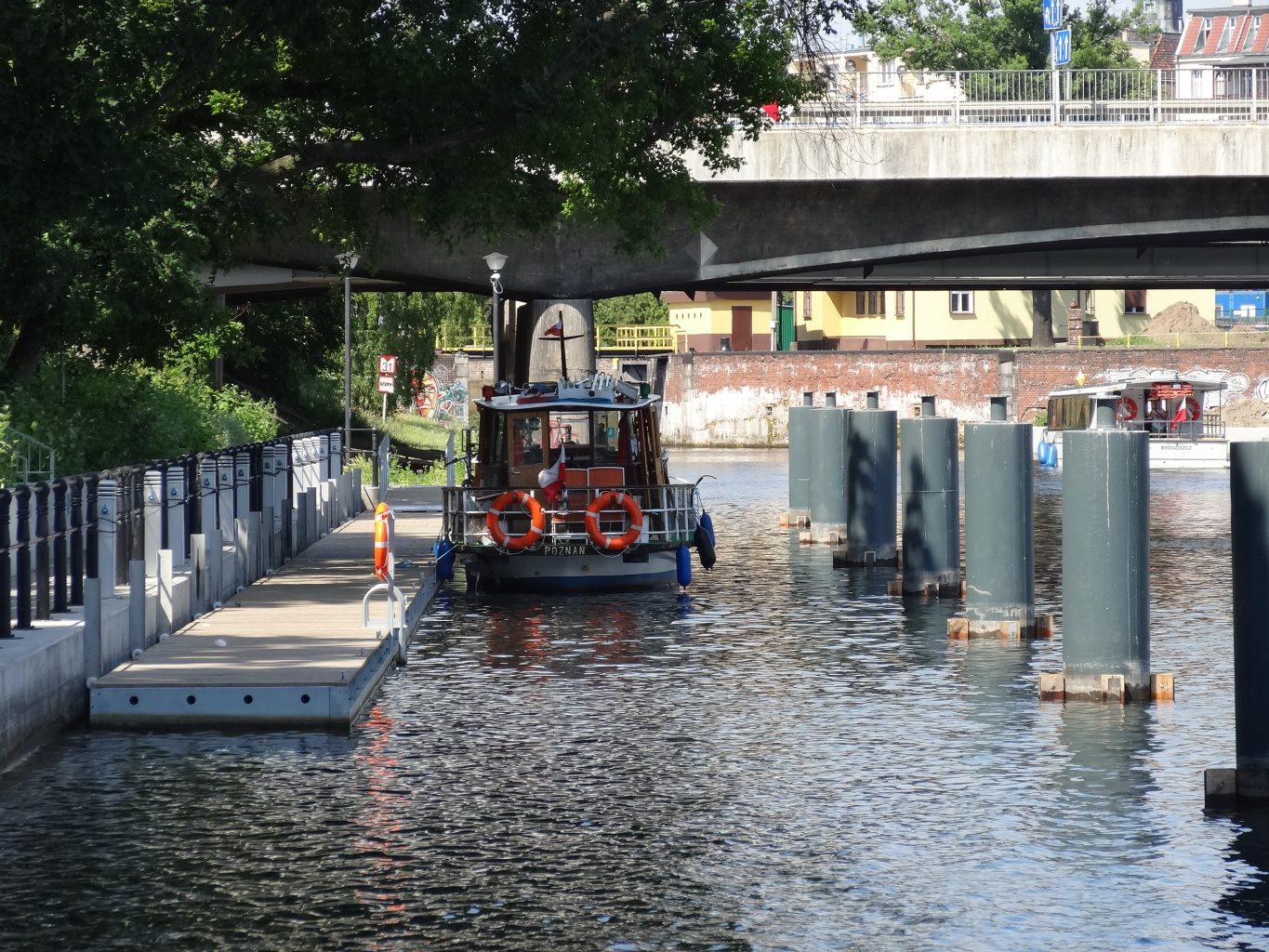 Przystań Bydgoszcz na Wyspie Młyńskiej